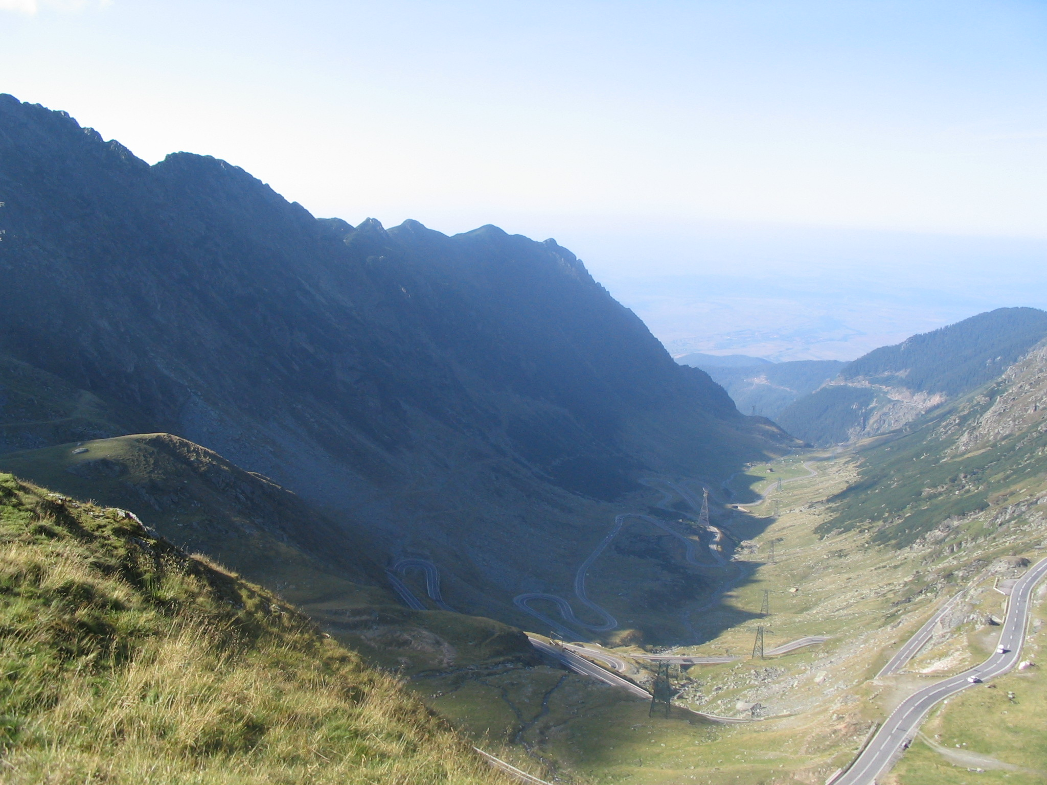 Auteur : Boris Baski